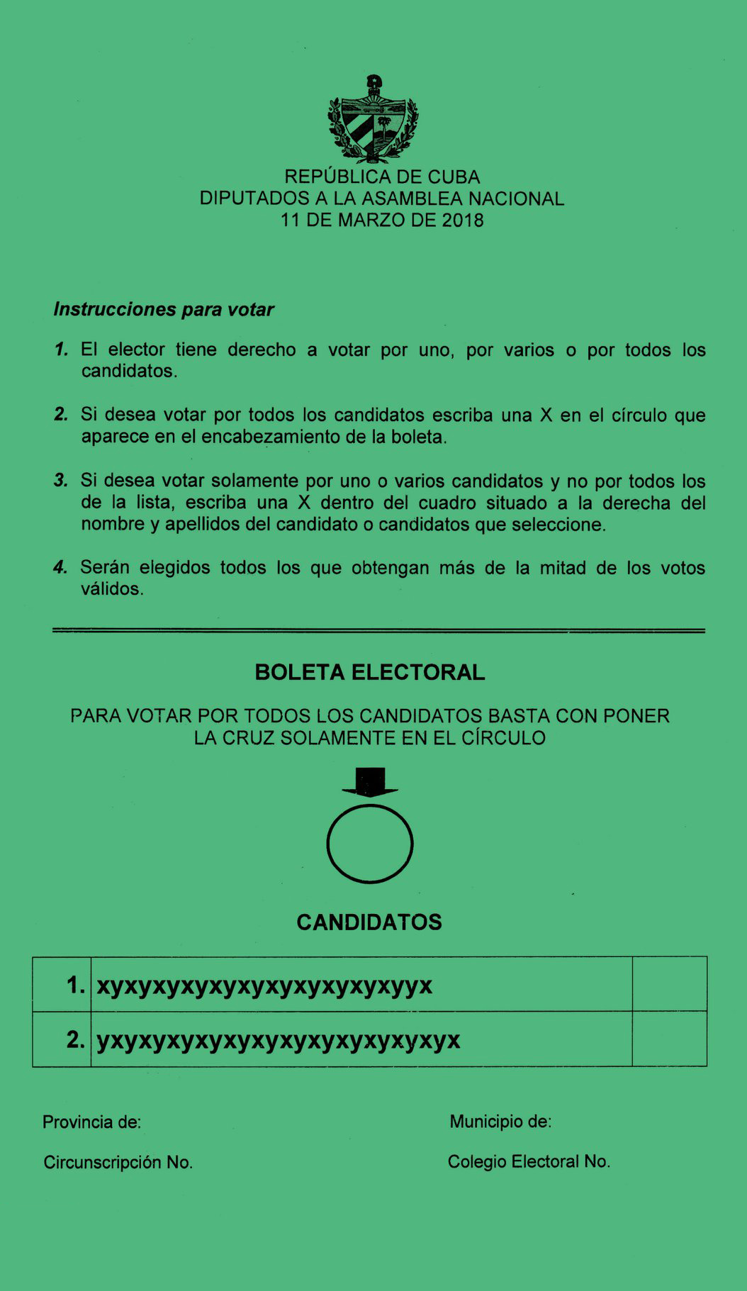 Boleta para diputados a la Asamblea Nacional de Cuba en las elecciones de marzo de 2018